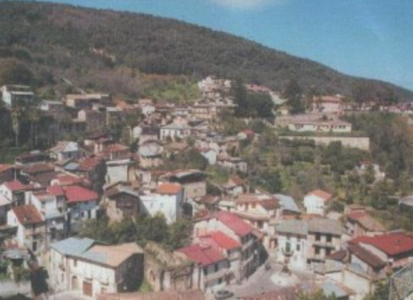 Una panoramica del paese